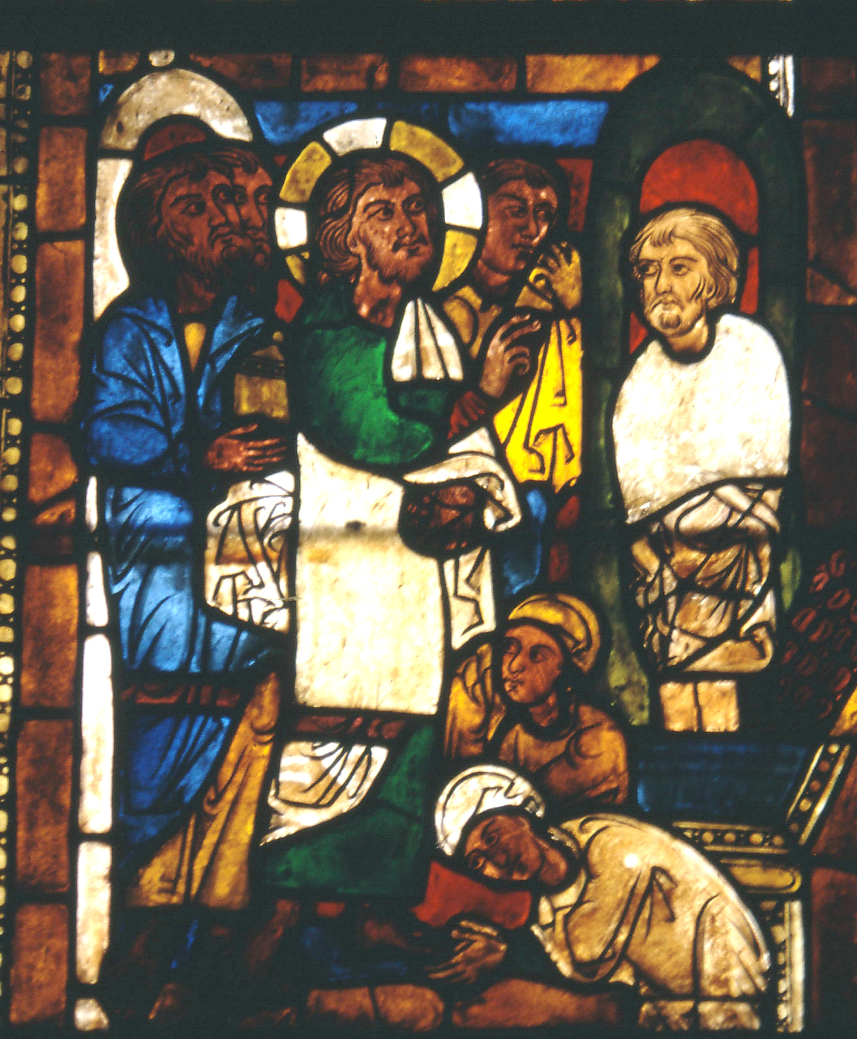 Sjonhems kyrka.Glasmålning:Jesus uppväcker Lasarus